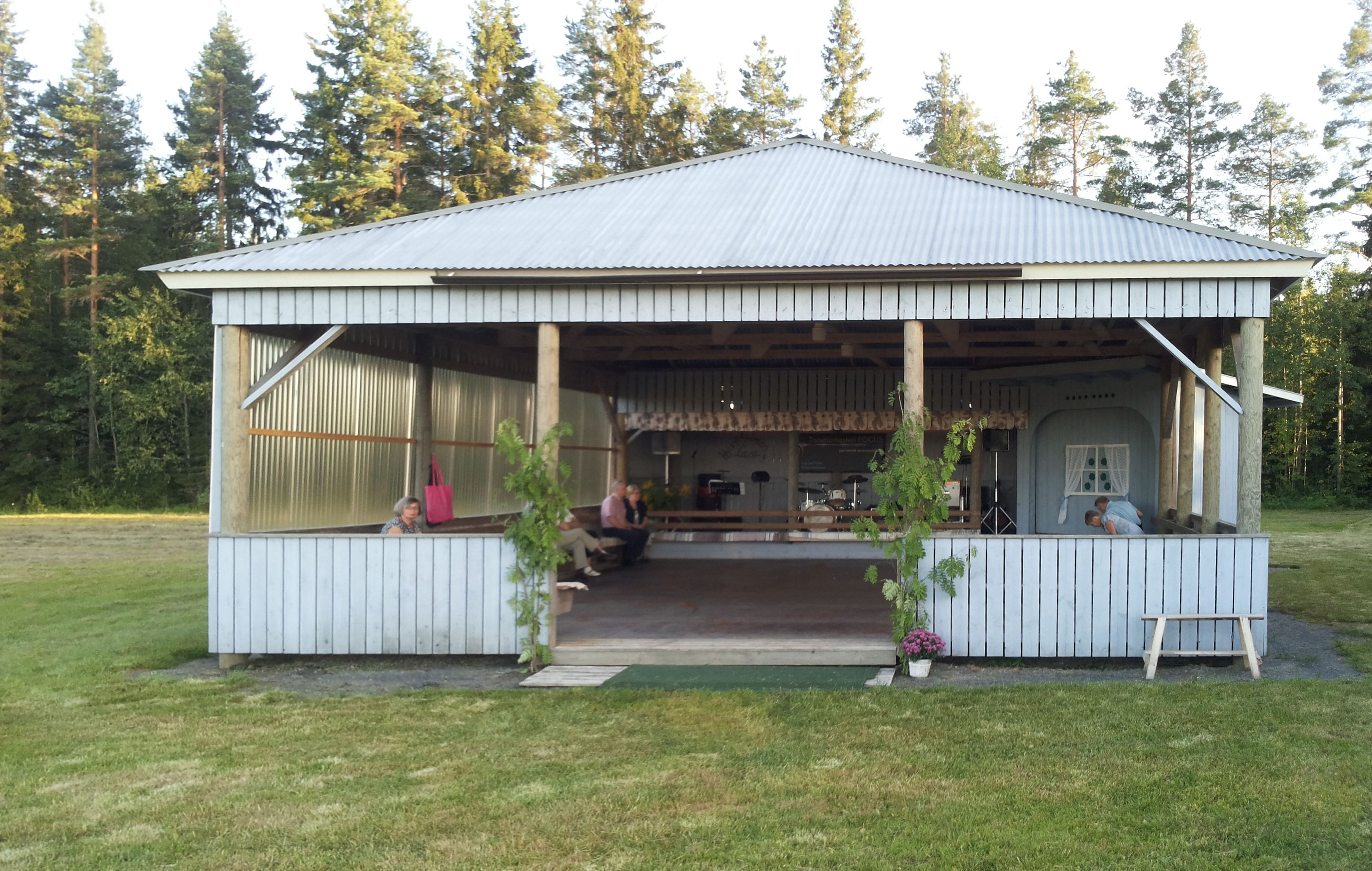 Hyrsynkulman lava